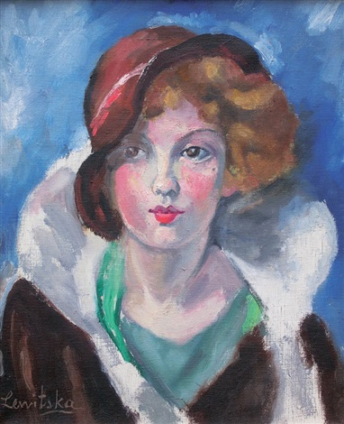 Portrait d'une Parisienne